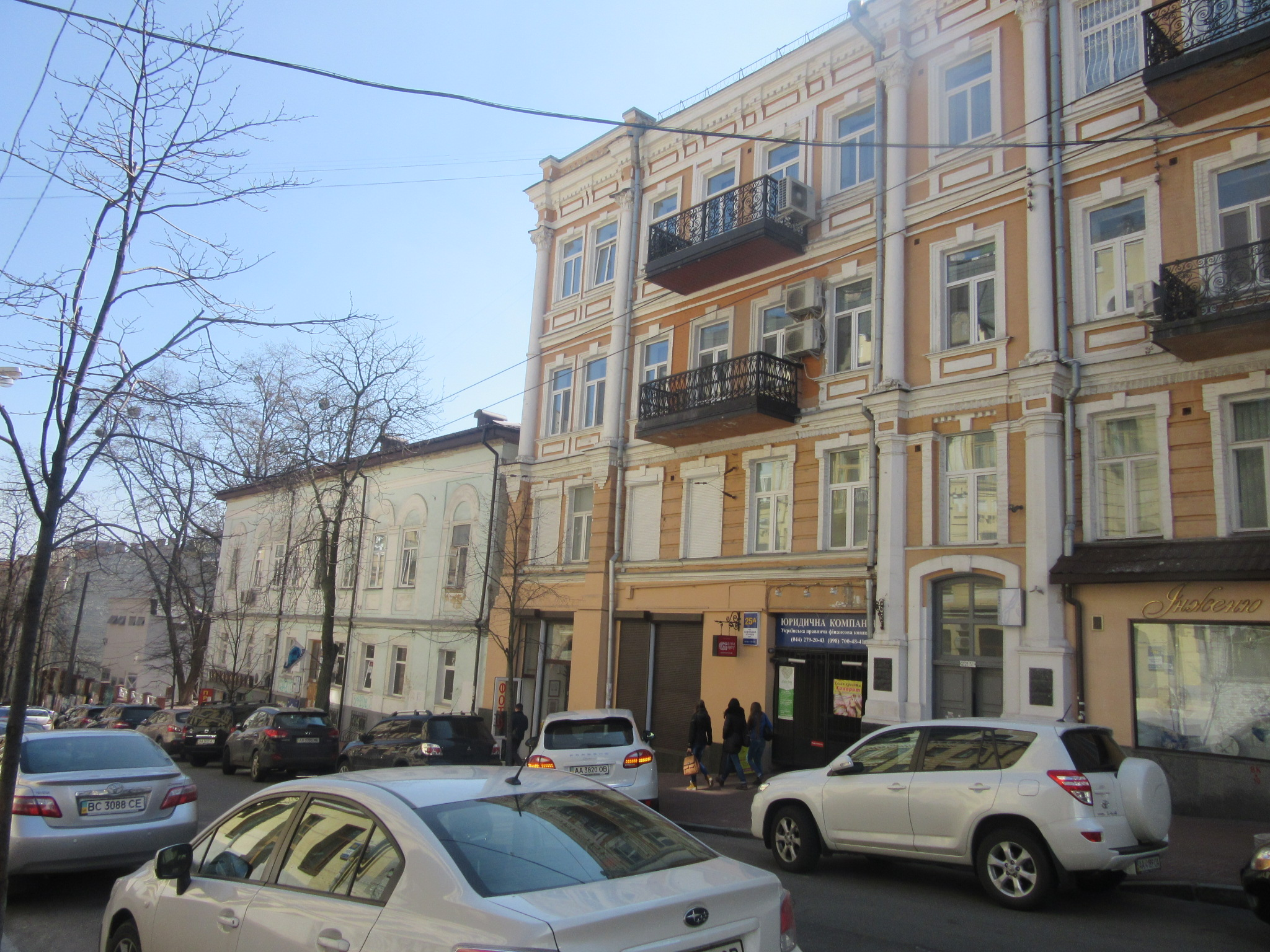 Будинок Марії Вязьмітіної по вулиці Софіївська, 25